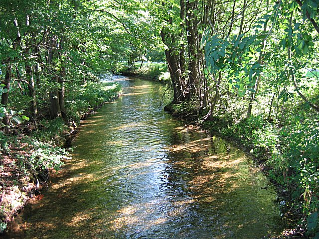 Schwebelbach nahe der Regattastrecke Schleißheim